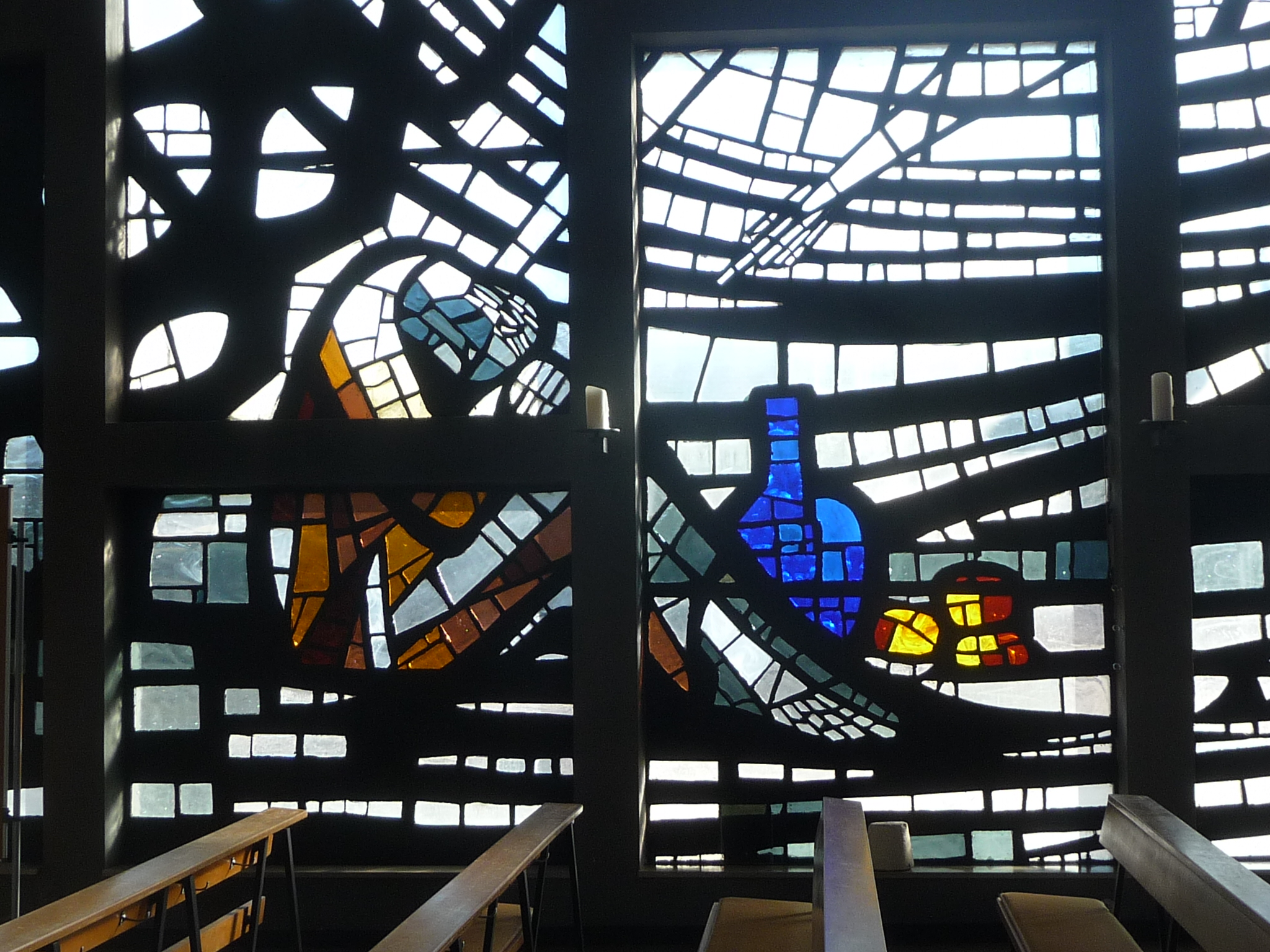 katholische Kirche in Leimersheim, Kreis Germersheim, Rheinland-Pfalz